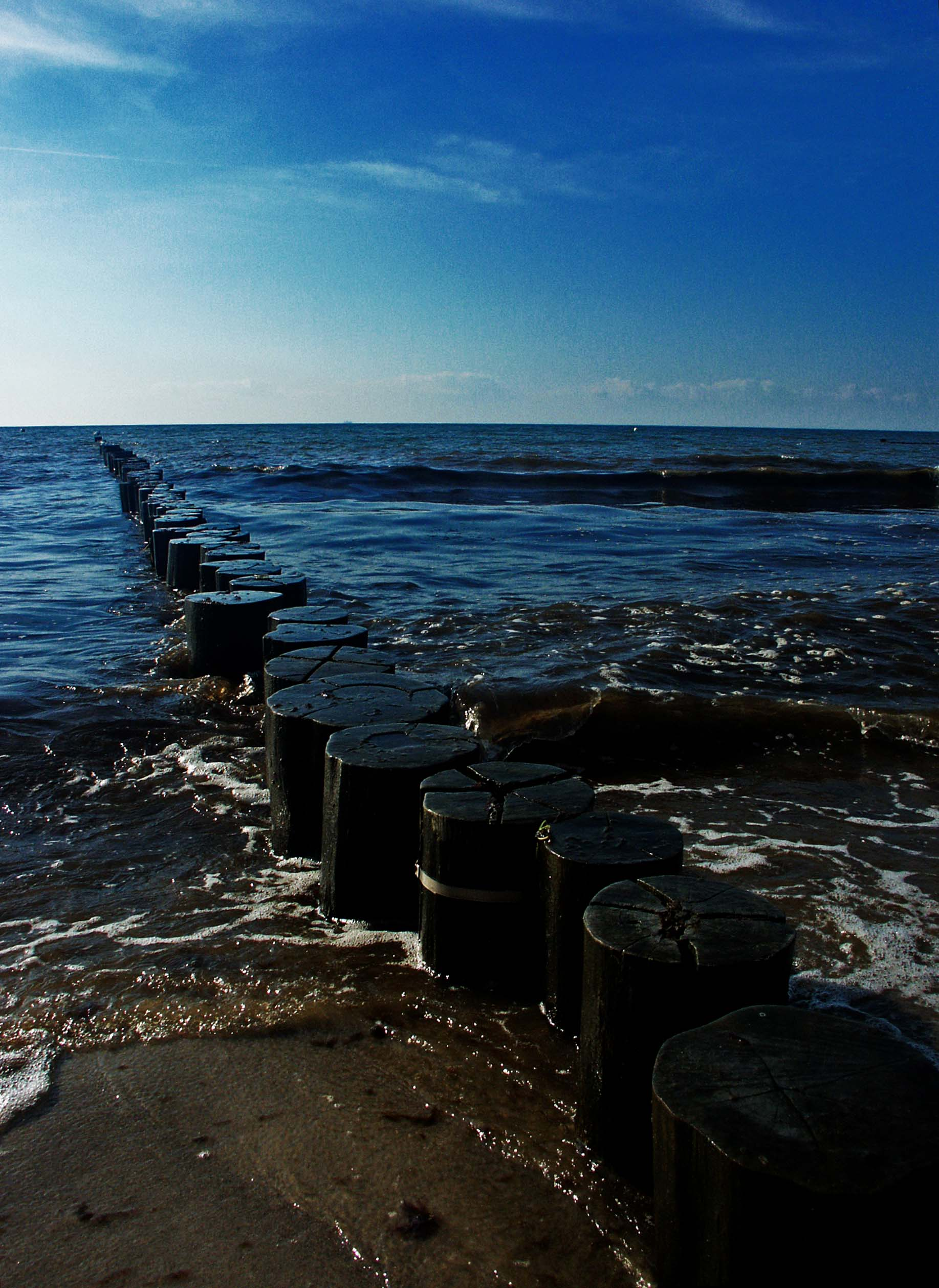 A groyne at Markgrafenheide, Germany.